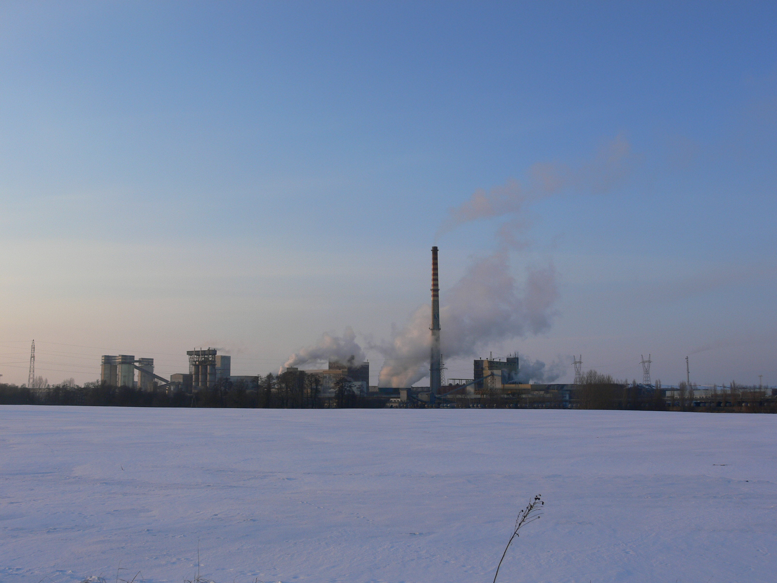 Inowrocław - Inowrocławskie Zakłady Chemiczne Soda Mątwy S.A..